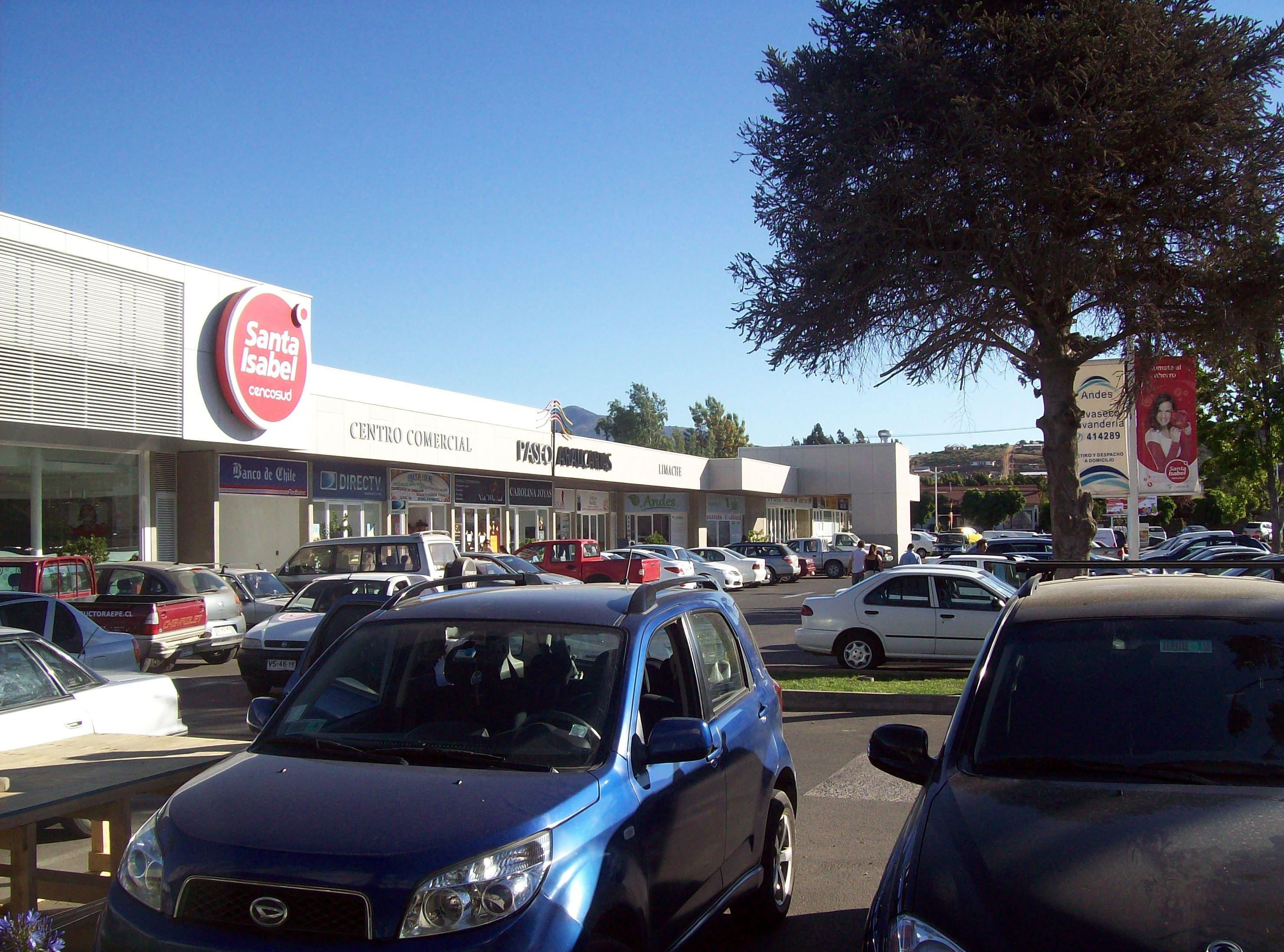 Centro Comercial Paseo Las Araucarias, Limache